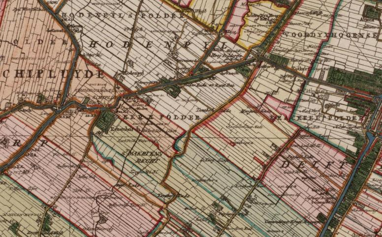 Kerkpolder.